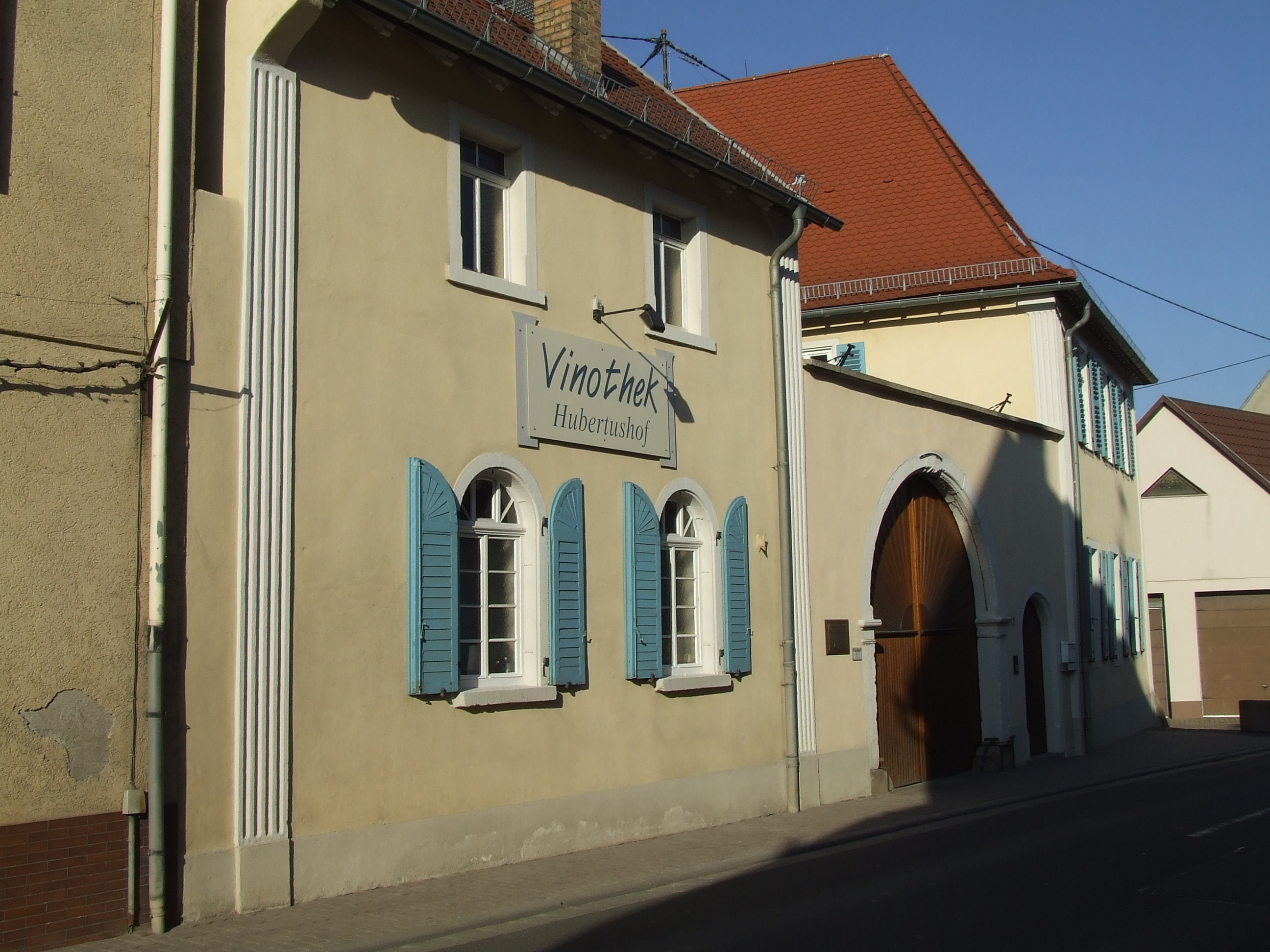 Vereinigte Weingüter Krebs-Grode, hier die Vinothek Hupertushof in Gau-Odernheim